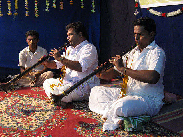 தமிழ்மரபின் மிகத் தொன்மையான இசைக்கருவியான நாதசுரத்தை இசைக்கும் இசைக்கலைஞர்கள்.